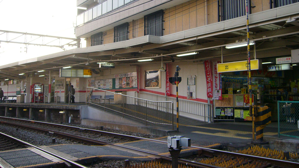 須磨寺駅